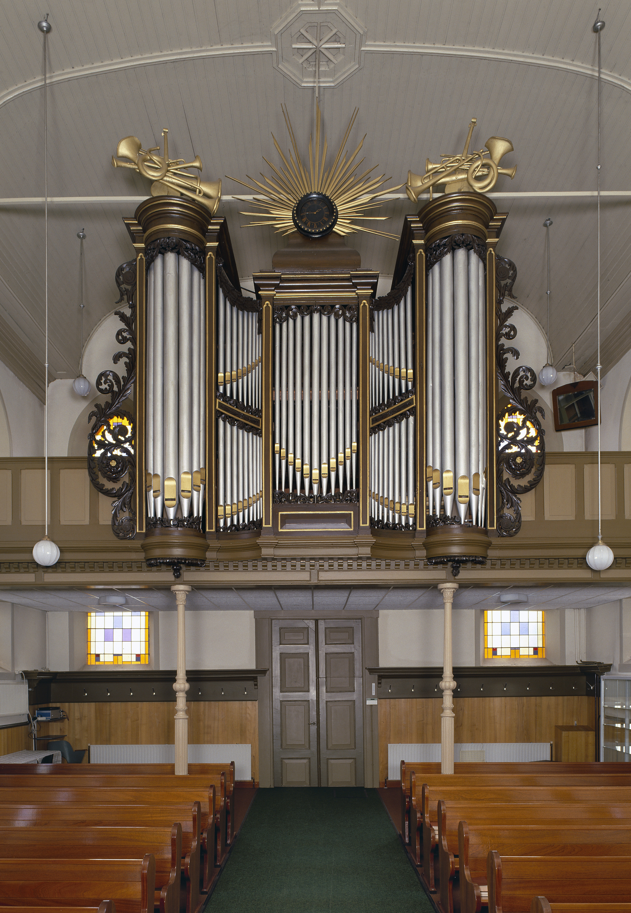 Lutherse kerk: Interieur, aanzicht orgel, orgelnummer 1046 (opmerking: Gefotografeerd voor Het Historische Orgel in Nederland 1865-1872)